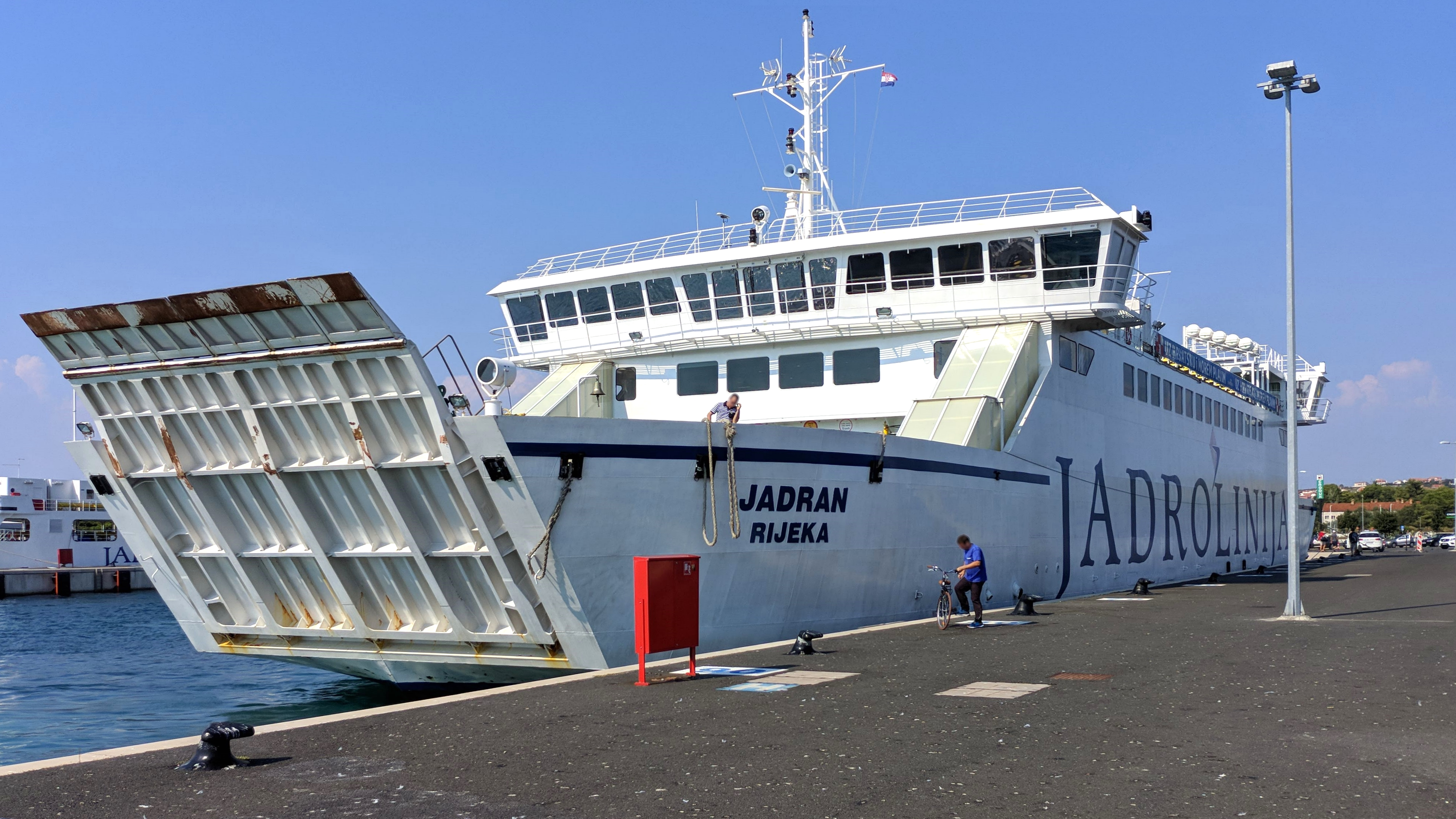 Die Jadran, ein 2010 gebautes Fährschiff der Jadrolinija, im Hafen von Zadar. Links im Hintergrund ist M/T Sveti Juraj zu sehen, eine kleinere und ältere Fähre der Jadrolinija.